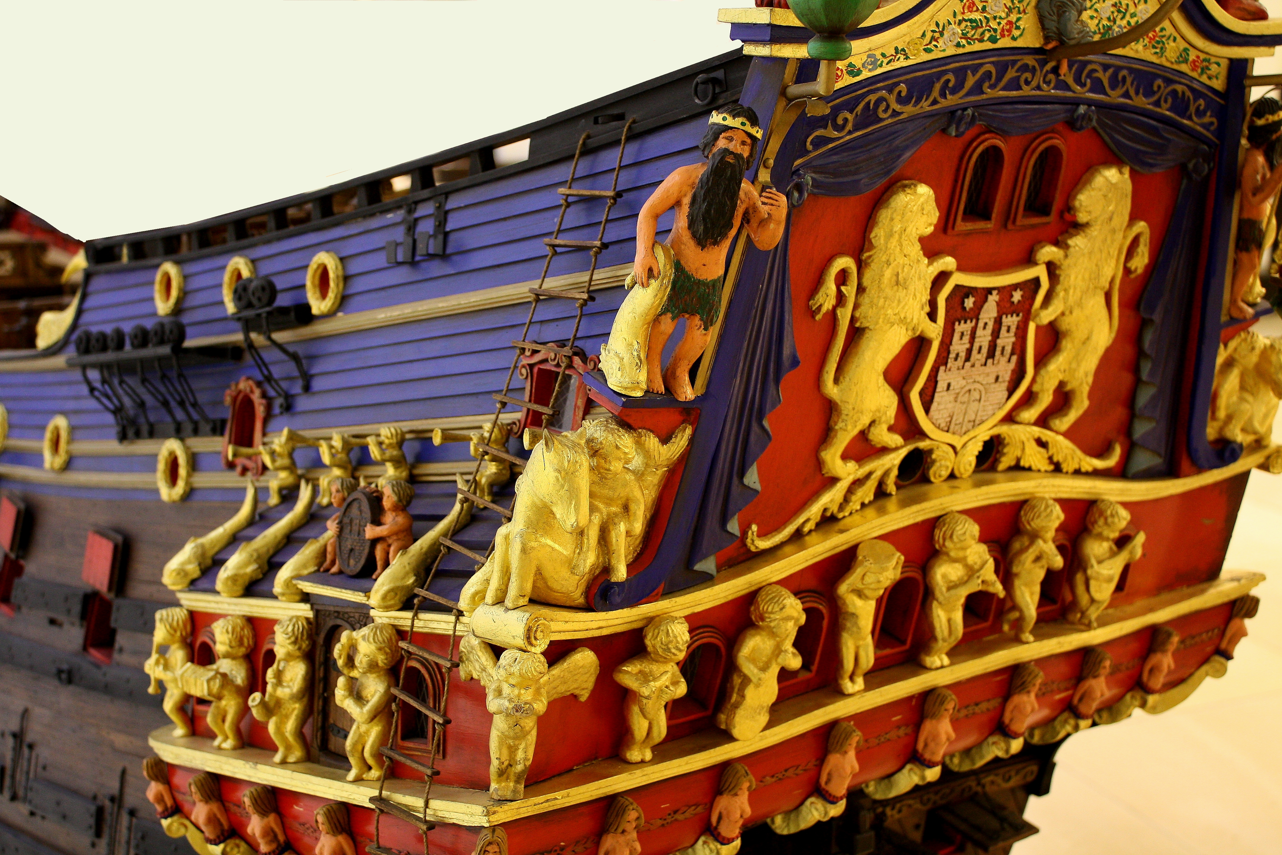 Modell des hamburgischen Konvoyschiffes Wapen von Hamburg (II) - Detailansicht Heckspiegel